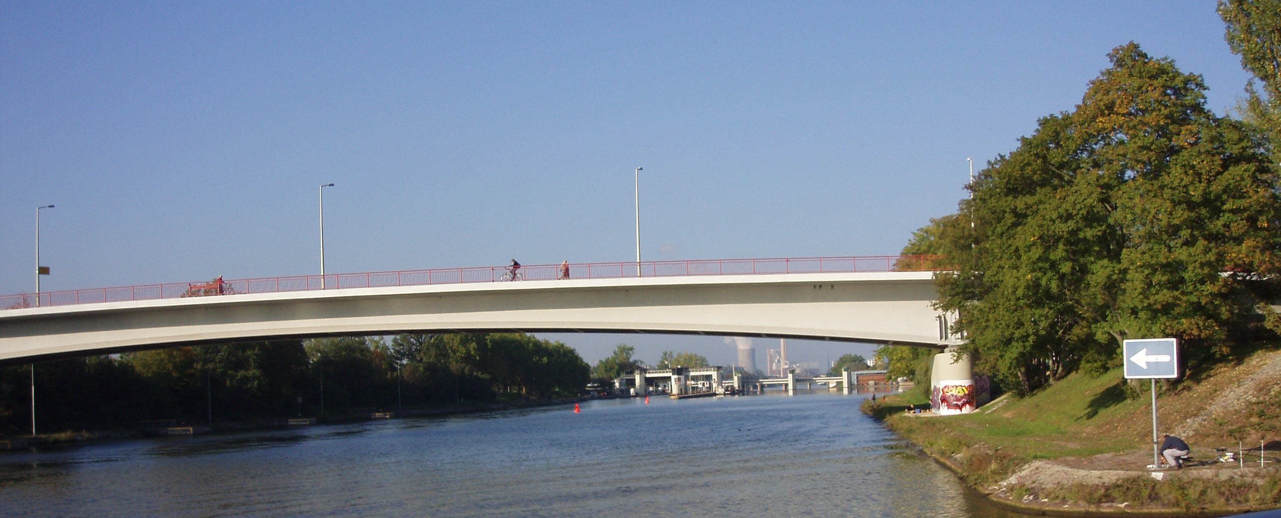 Die Böckinger Brücke führt über den Neckarkanal und ist eine Bogenbrücke wobei der Bogen unter der Fahrbahn verläuft. Die Brücke besteht aus Stahl und wurde 1996 errichtet[1].Brücken in Heilbronn